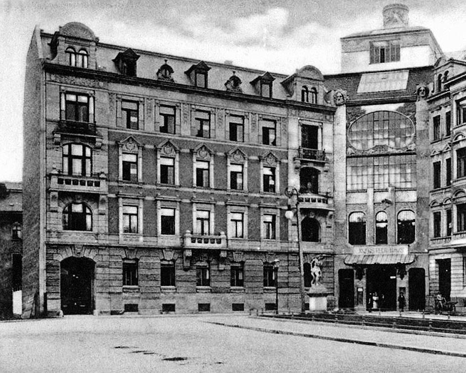 Leipzig, Platz am Künstlerhaus (seit 1922 Nikischplatz): Künstlerhaus (rechts im Bild), erbaut 1899–1900 von Fritz Drechsler